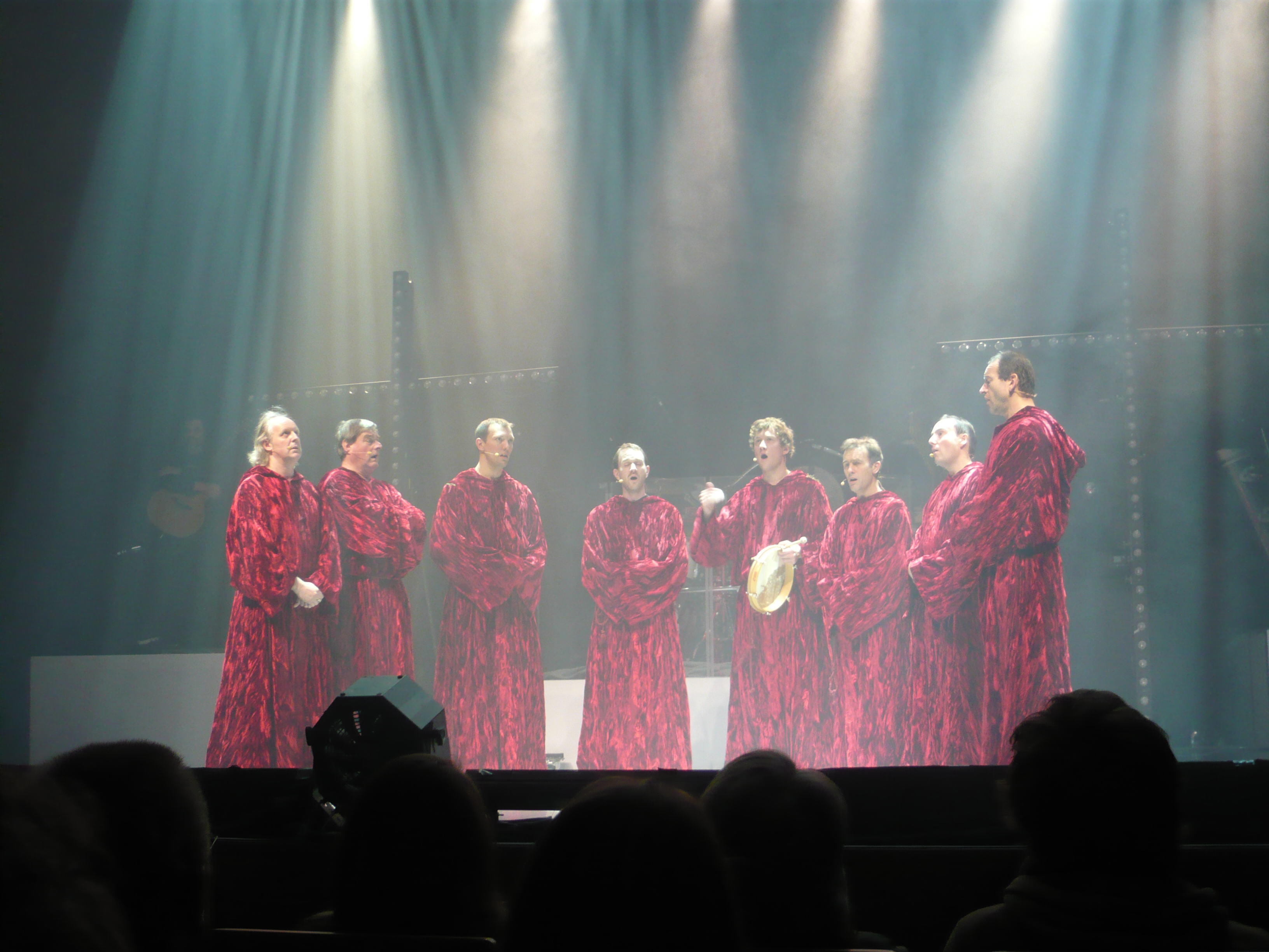 Gregorian und Amelia Brightman live im Konzerthaus Freiburg